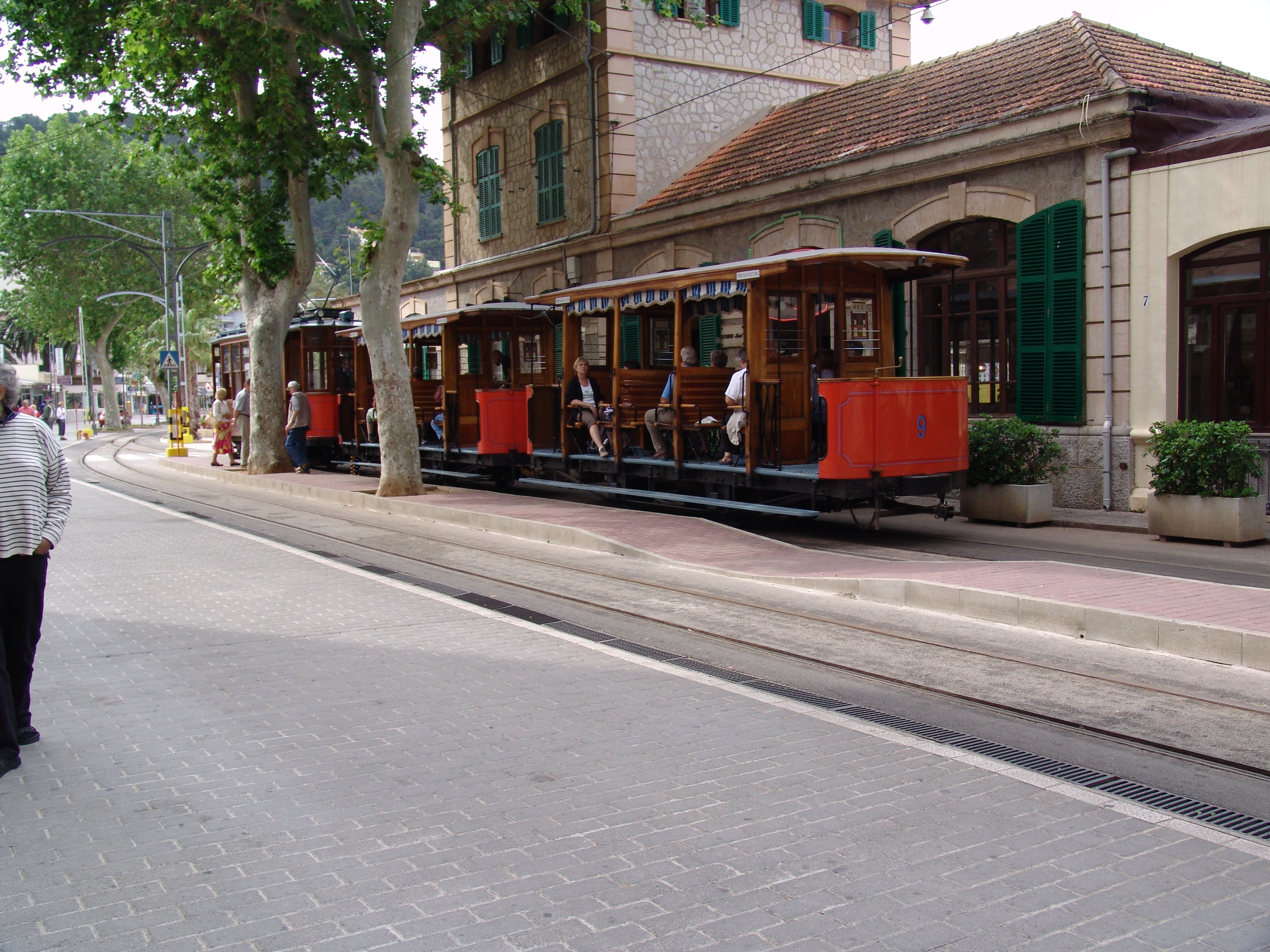 Die Straßenbahn von Port de Sóller nach Sóller